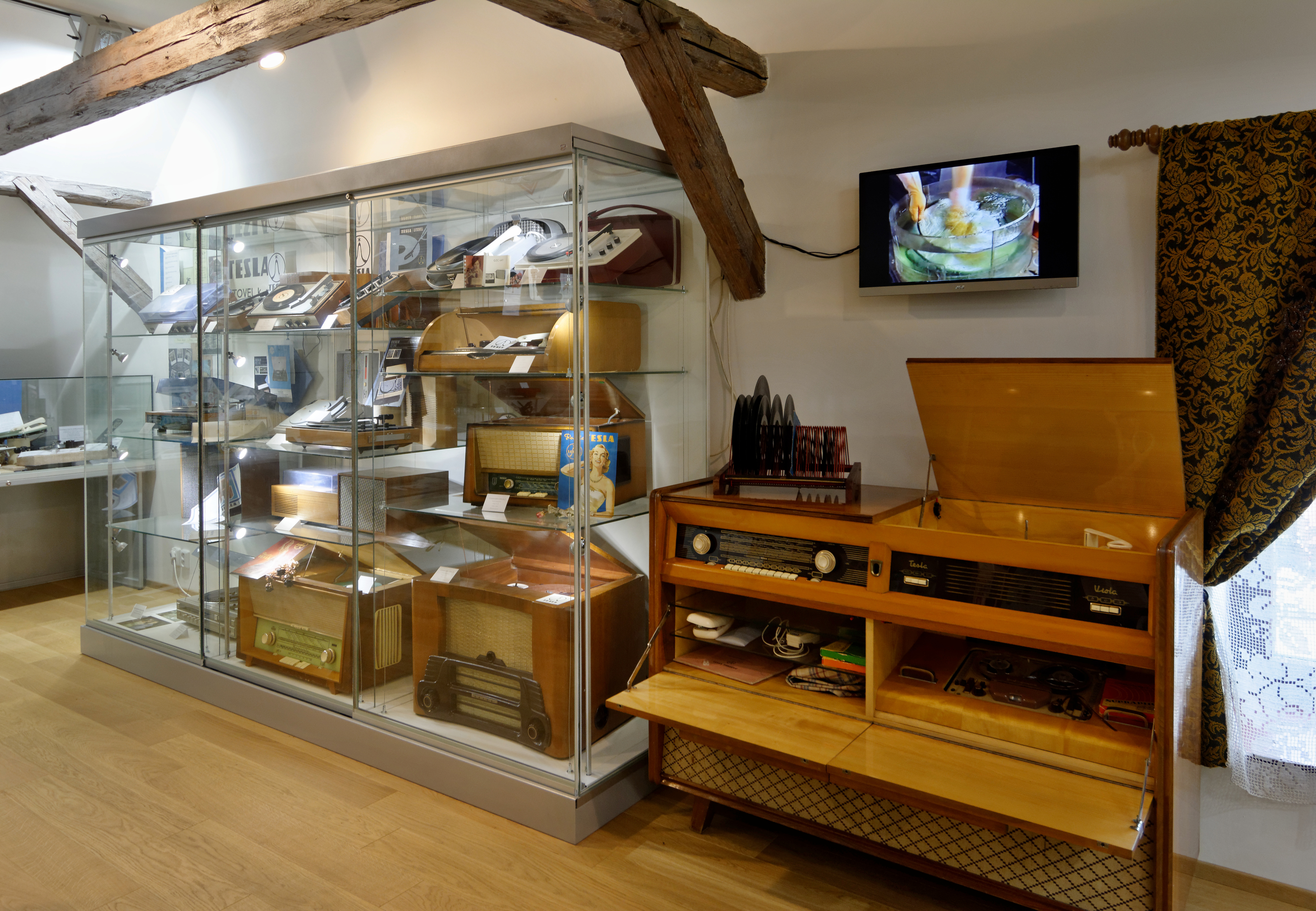 Muzeum v Litovli, pohled do expozice.